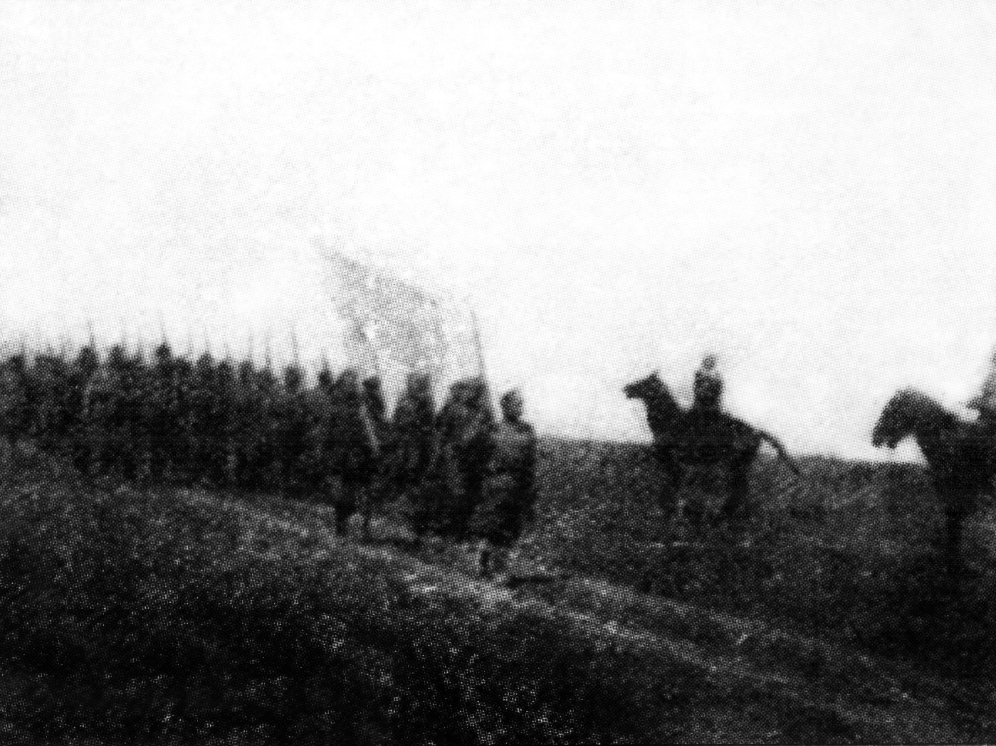 Соединение отряда полковника Дроздовского с Добровольческой армией. (Из журнала "Часовой")